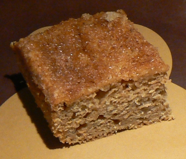 Applesauce cake